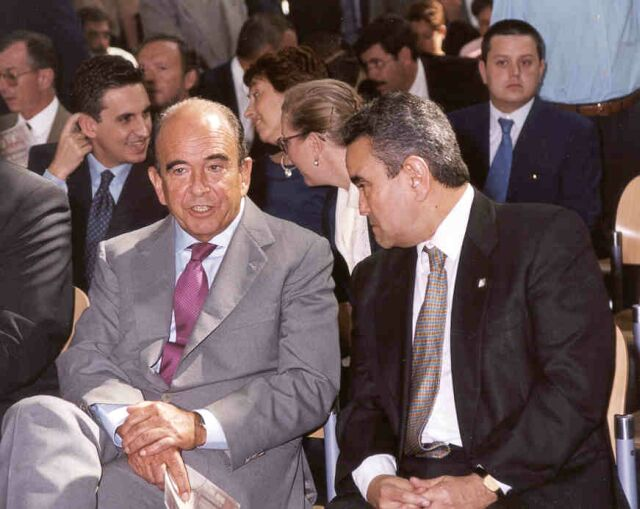 Emilio Botín y Andrés Pedreño Presentación Universia